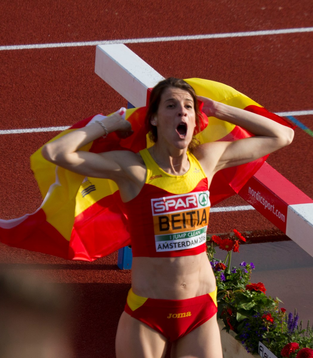 0736 beitia vlag